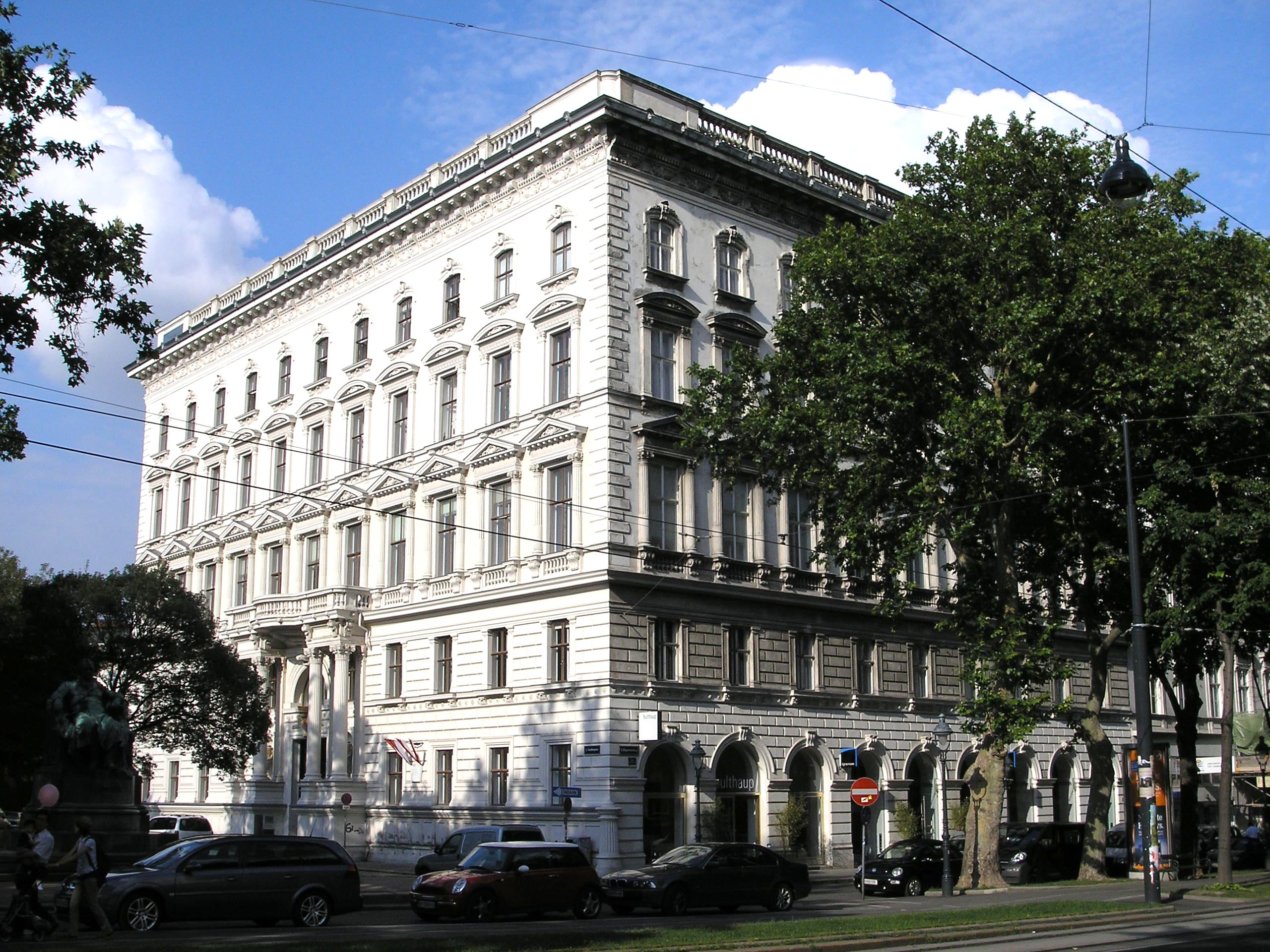 Palais Schey in Wien erbaut 1863/64 nach Plänen von August Schwendewein und für Friedrich Freiherr Schey von Koromla, Bankier und Förderer der Kunst.